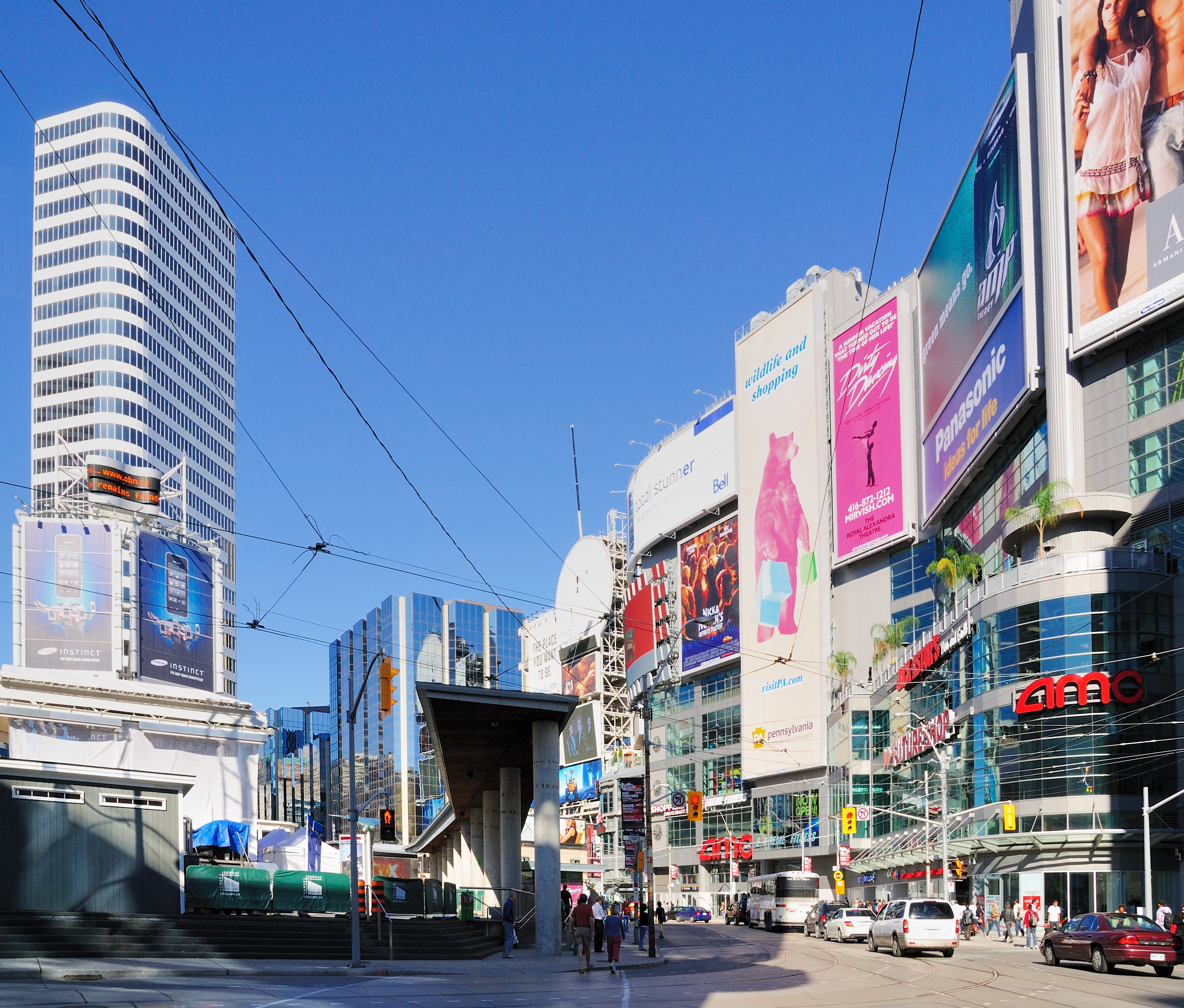 Yonge-Dundas Square (Blick nach Westen), Toronto